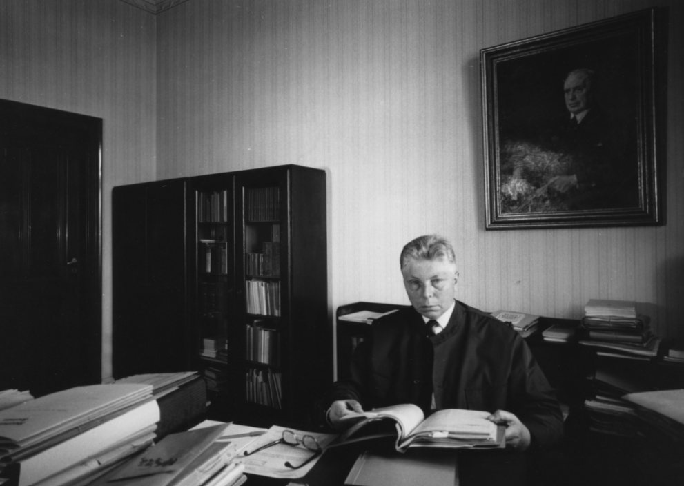 Fotografie von Karl Heinz Schwebel.